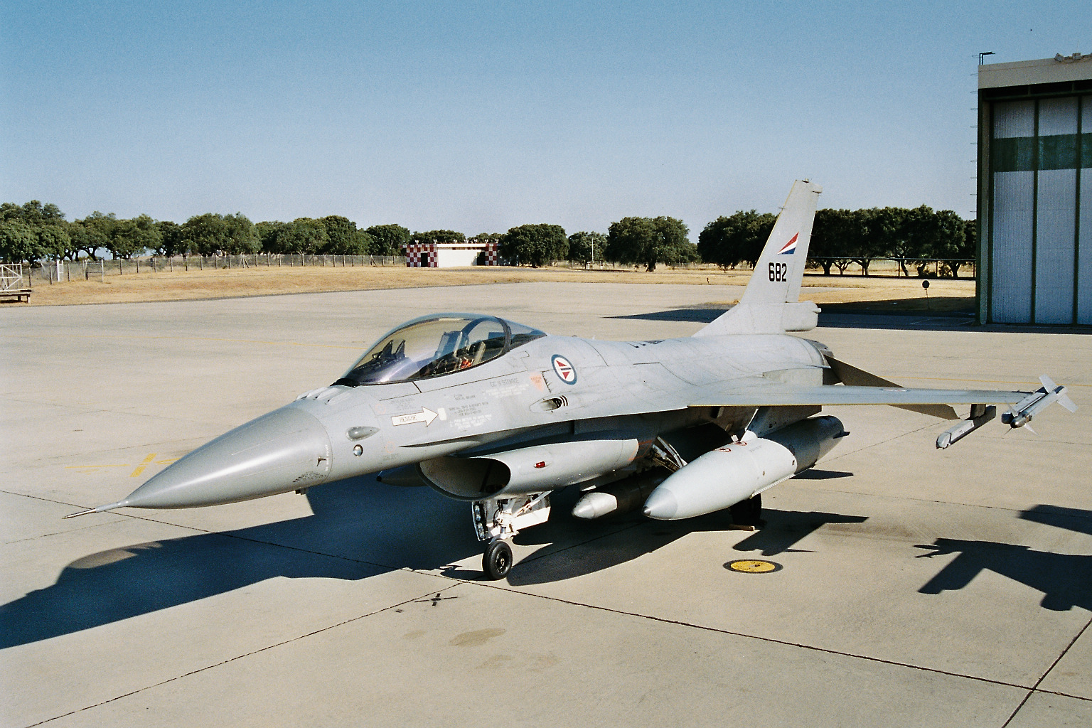 F-16